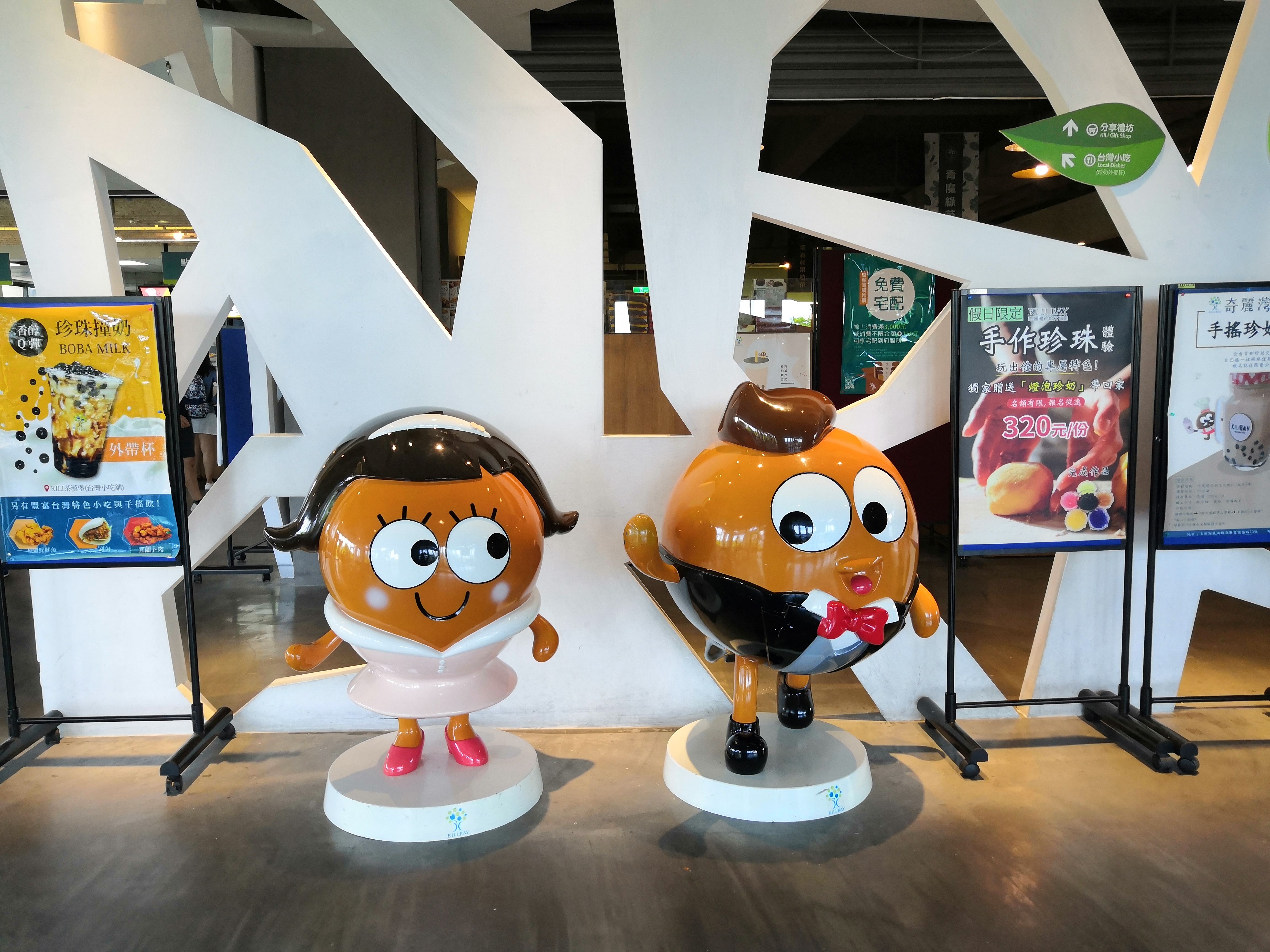 奇麗灣珍奶文化館大廳，吉祥物